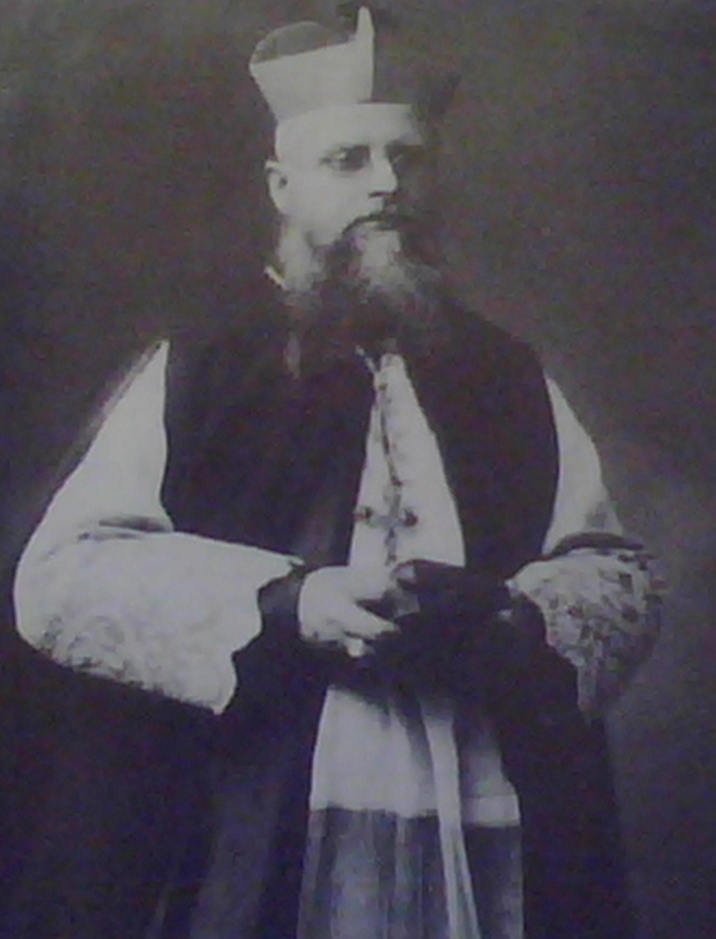 Monignore, Vescovo Cattolico